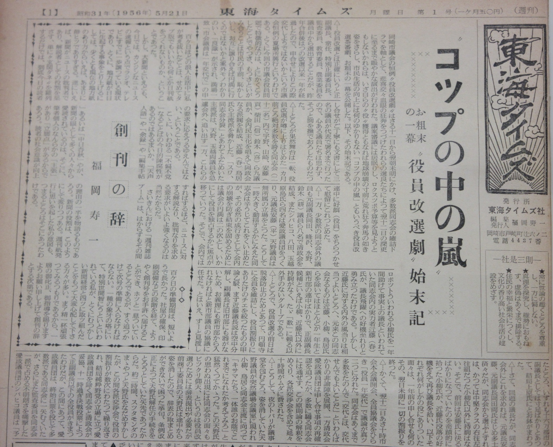 『東海タイムズ』1956年5月21日号、1面、創刊号。